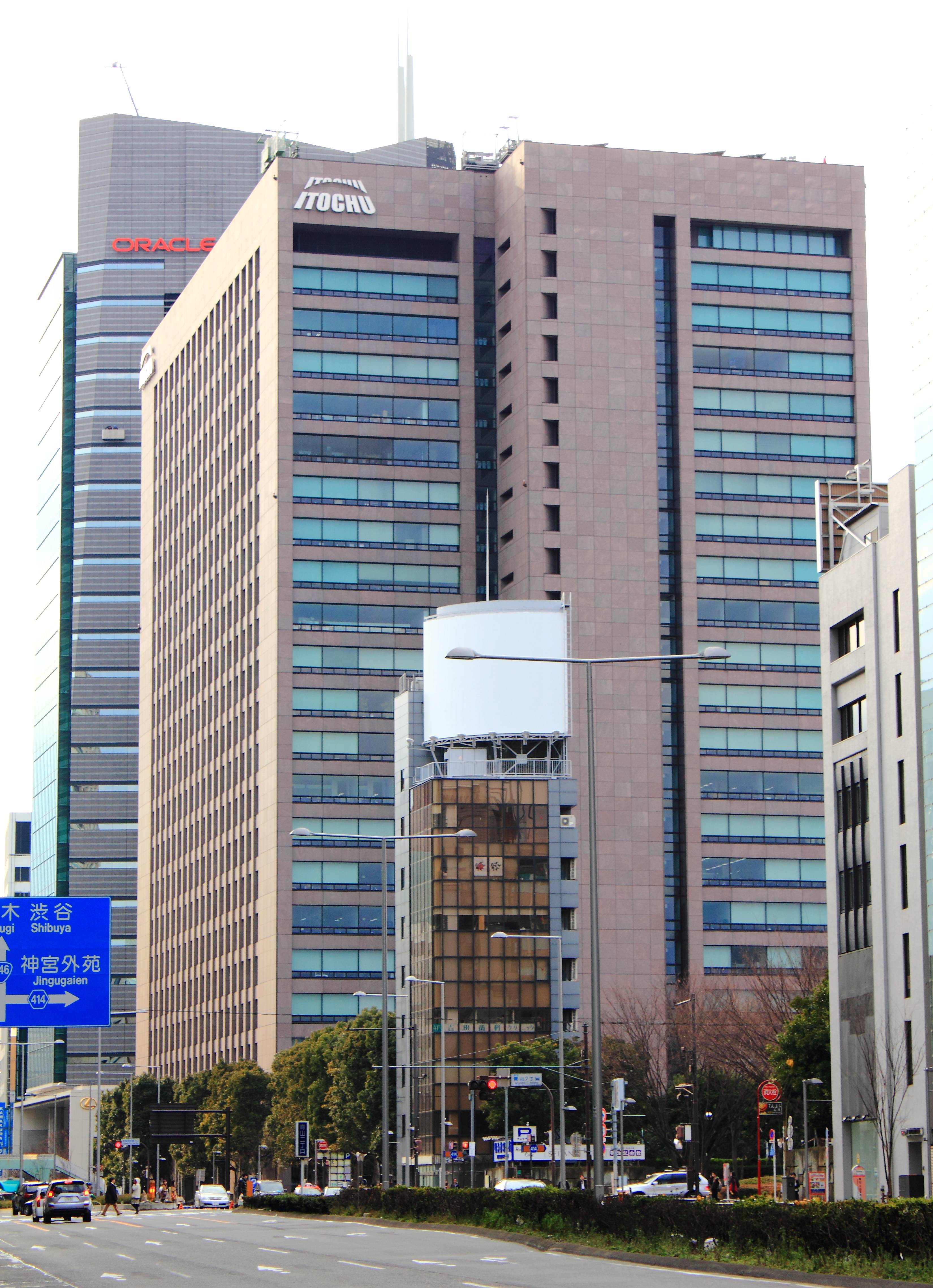 伊藤忠商事東京本社（東京都港区）